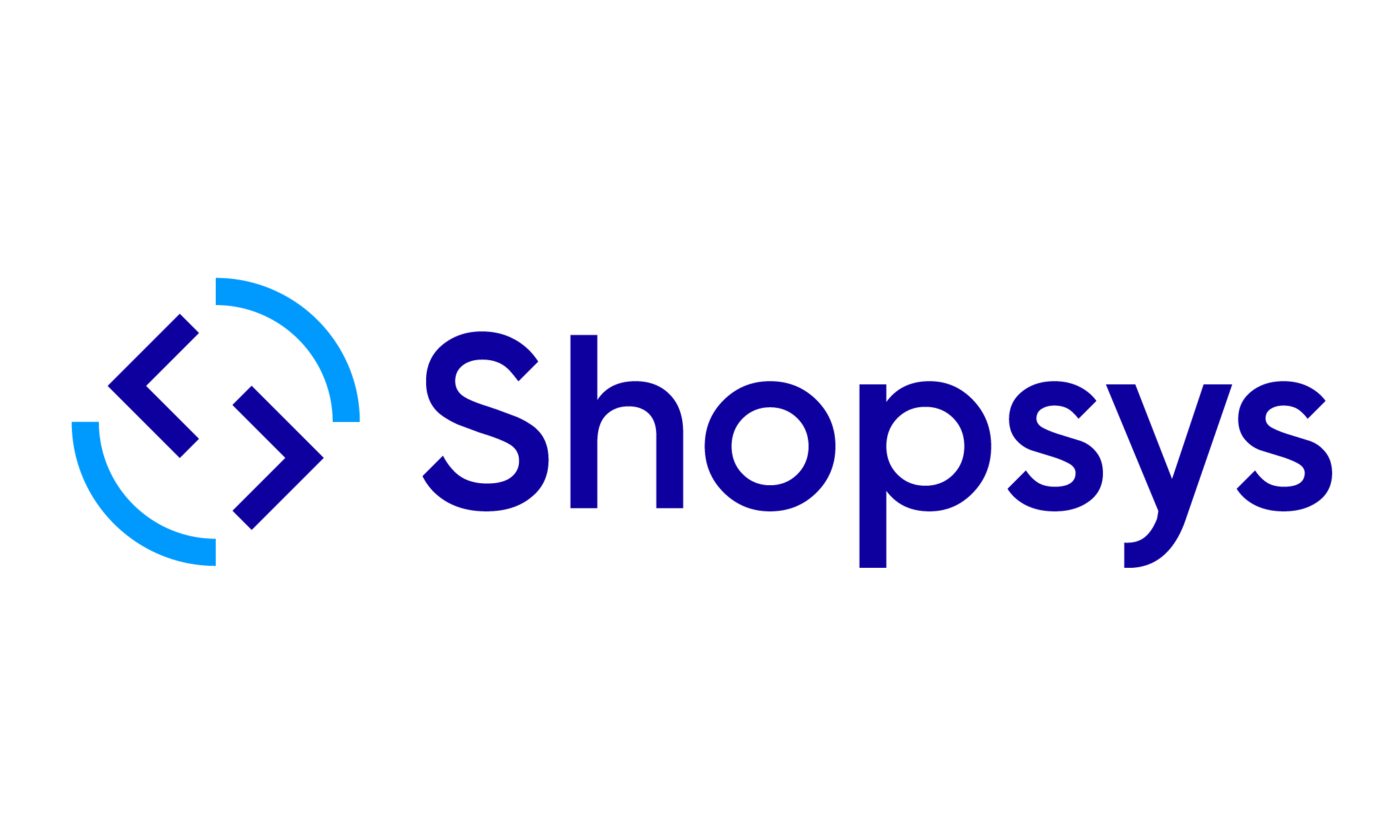 Shopsys logo